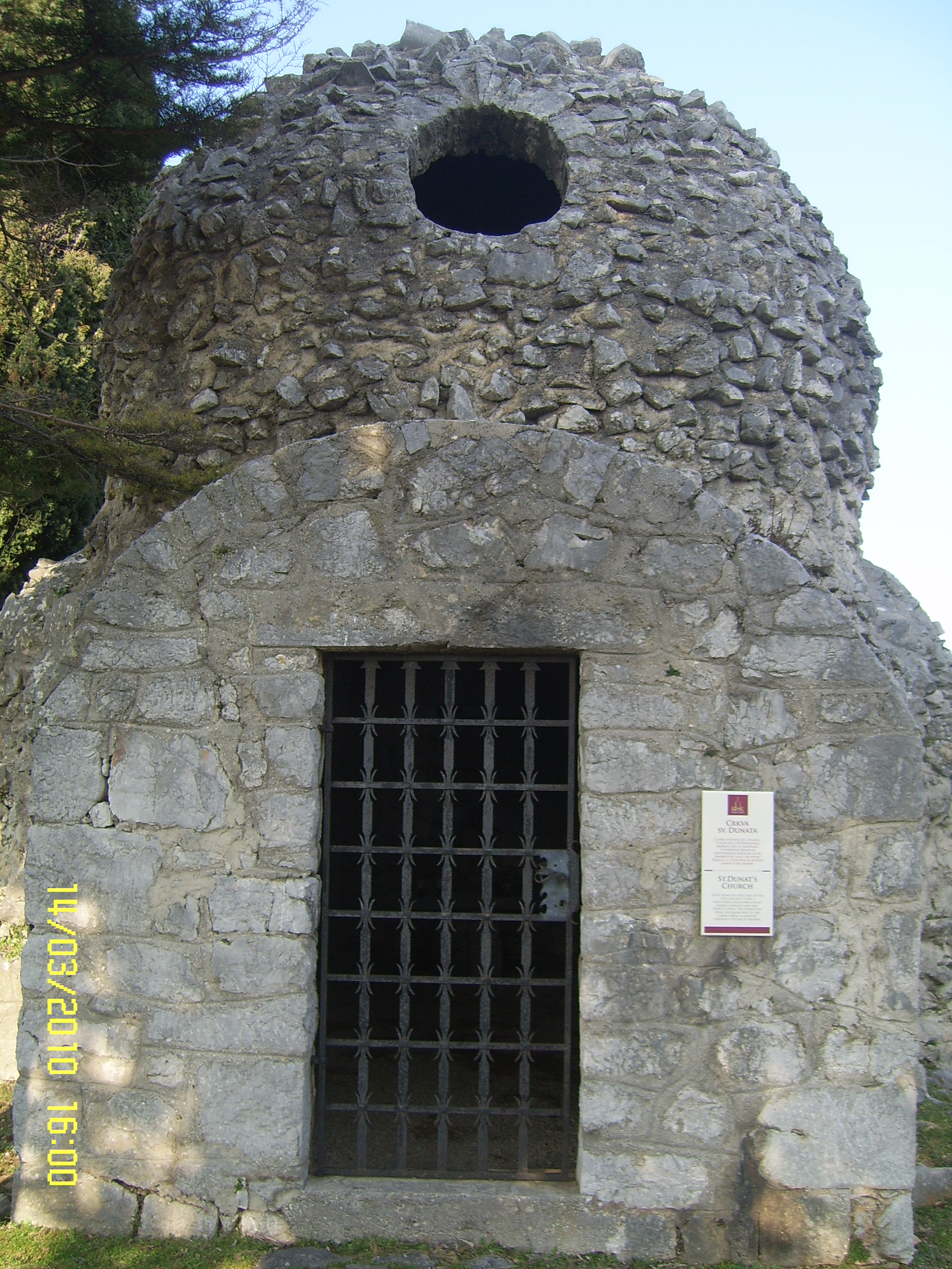 starohrvatska arhitektura, crkvica sveti Dunat kraj Punta na otoku Krku, 9. st.